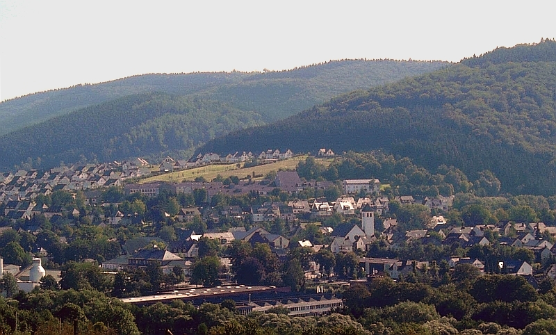 Bestwig , Germany.